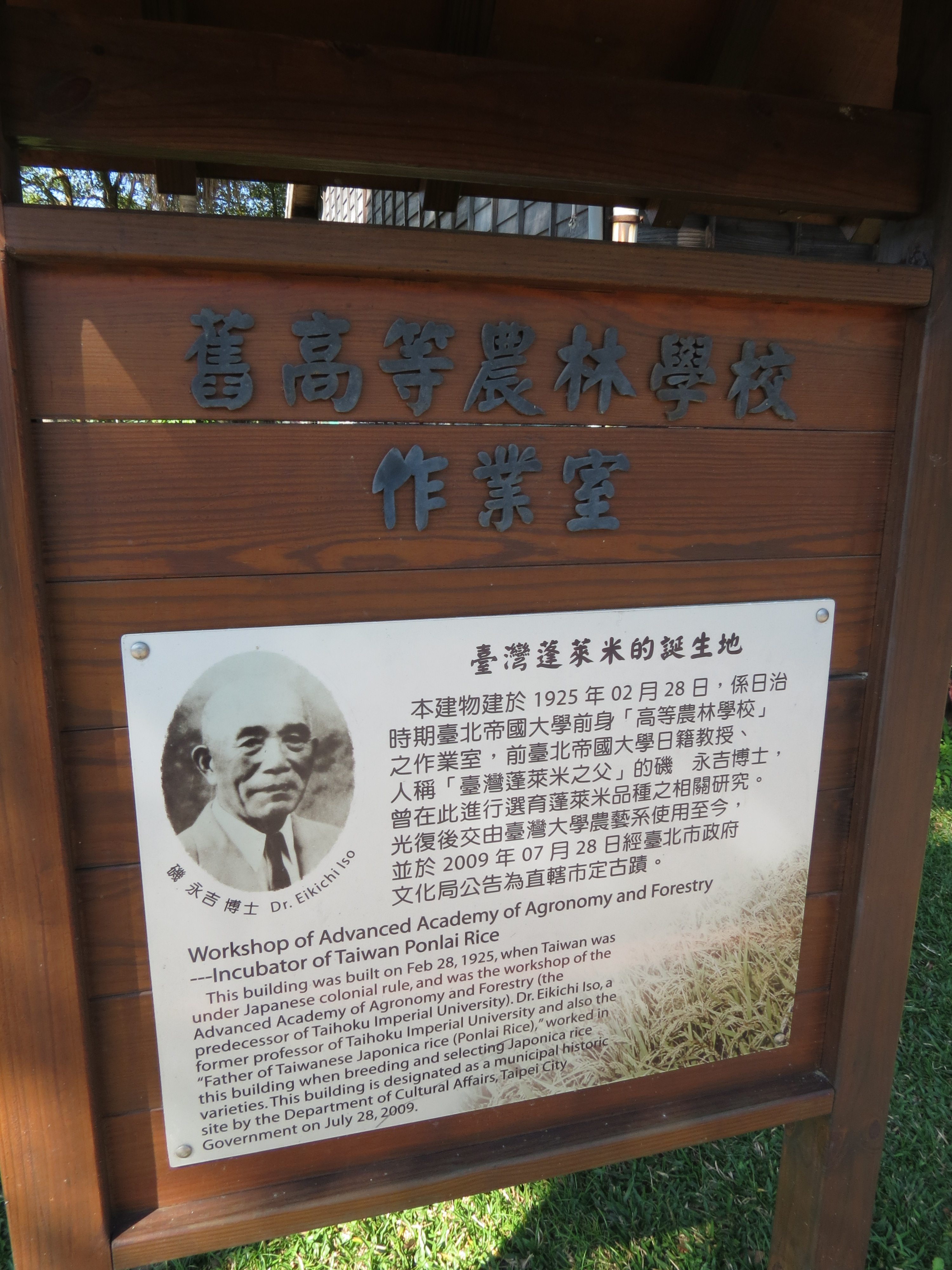 中文（台灣）: 台大磯小屋的歷史講解牌